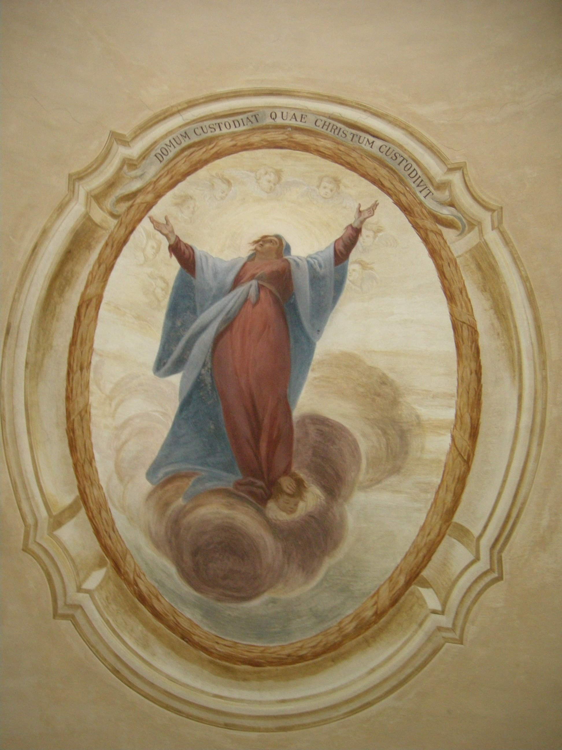 Soragna, rocca